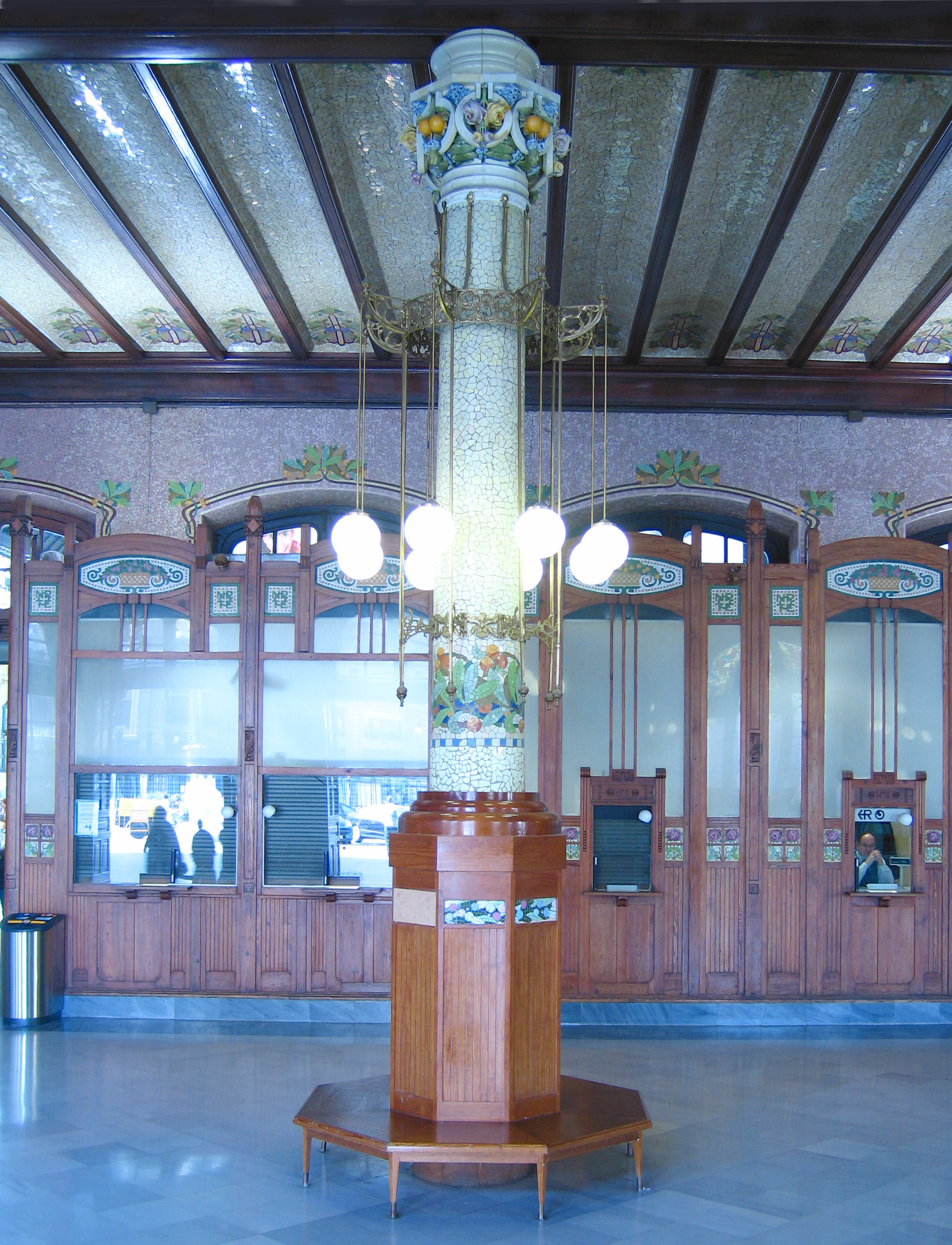 estació nord València